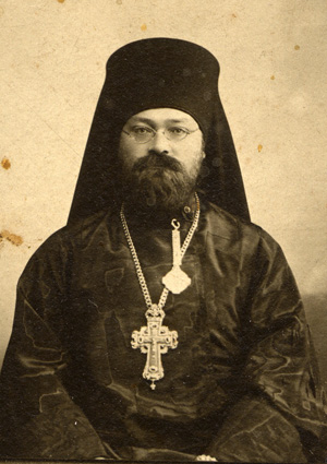 Ефрем (Кузнецов) в сане архимандрита (позднее - епископ Селенгинский)